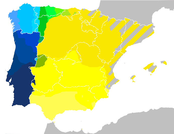 Lenguas iberorromances occidentales.